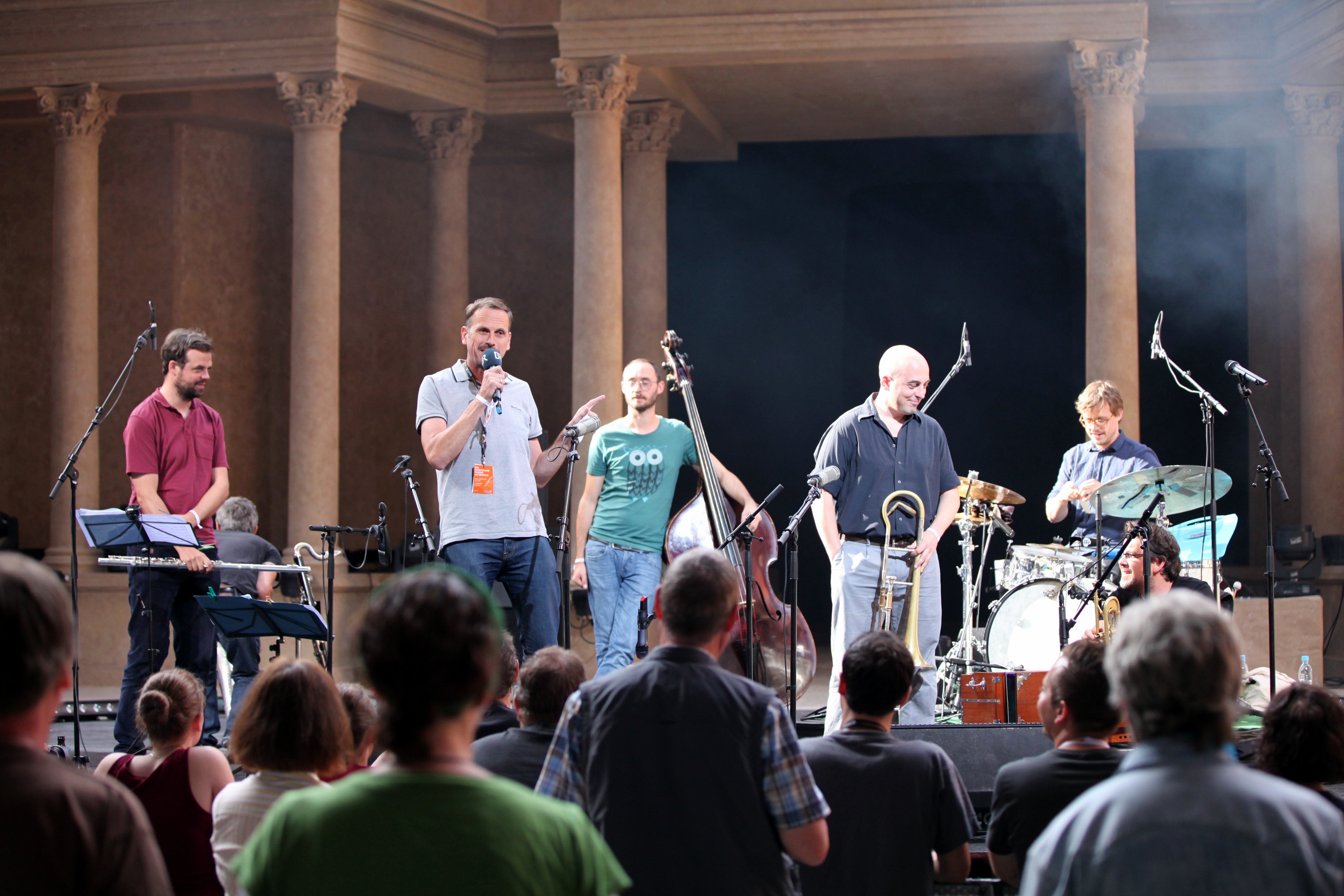 Alien Ensemble auf dem Heimatsound-Festival 2015 in Oberammgergau von Links: Oliver Roth mit Altflöte Achim Bogdahn (Moderator) Benny Schäfer am Bass Mathias Götz mit Posaune Andi Haberl am Schlagzeug